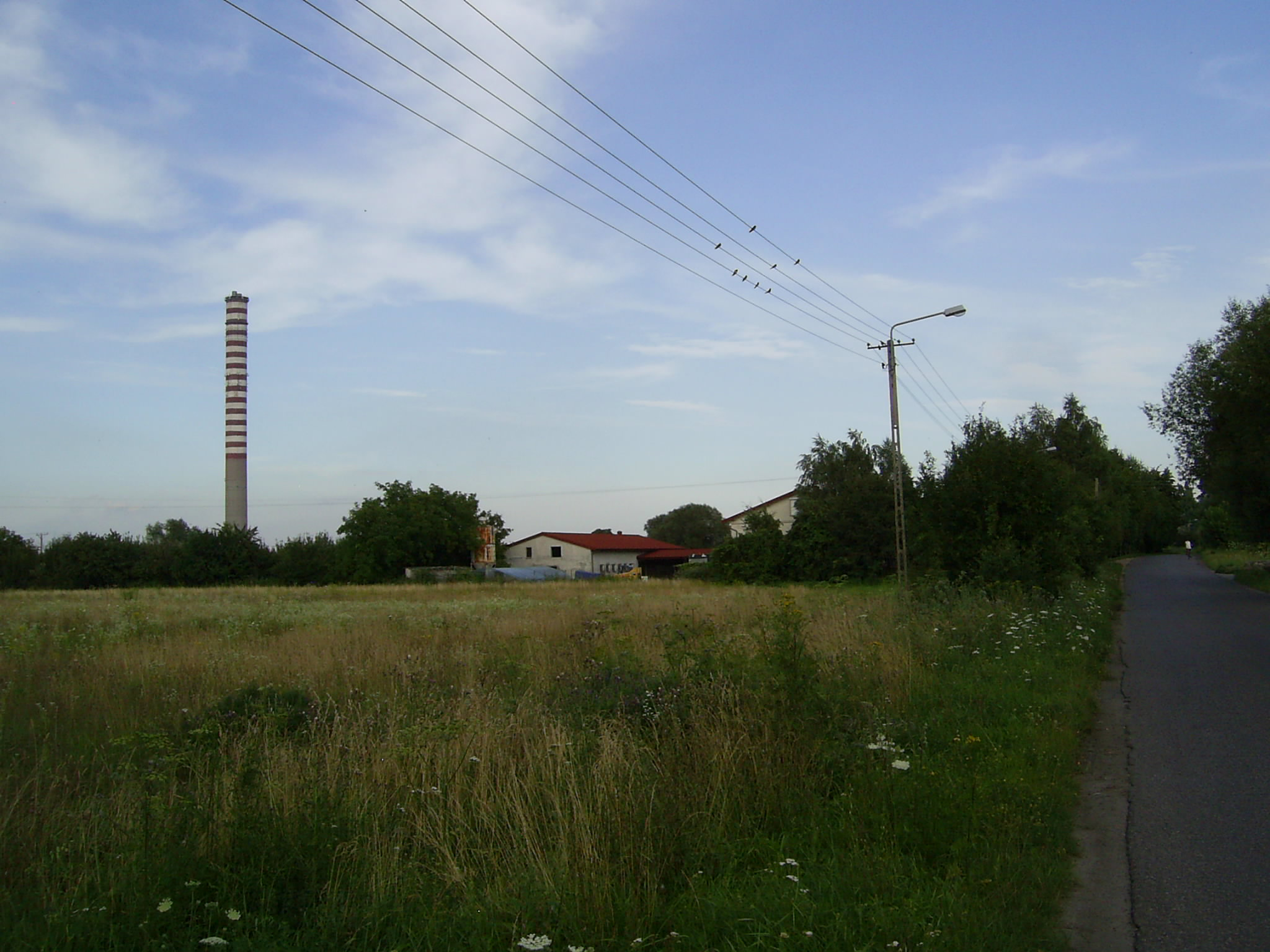 Widok od wschodu na Koszajec i EC Pruszków w Mosznie